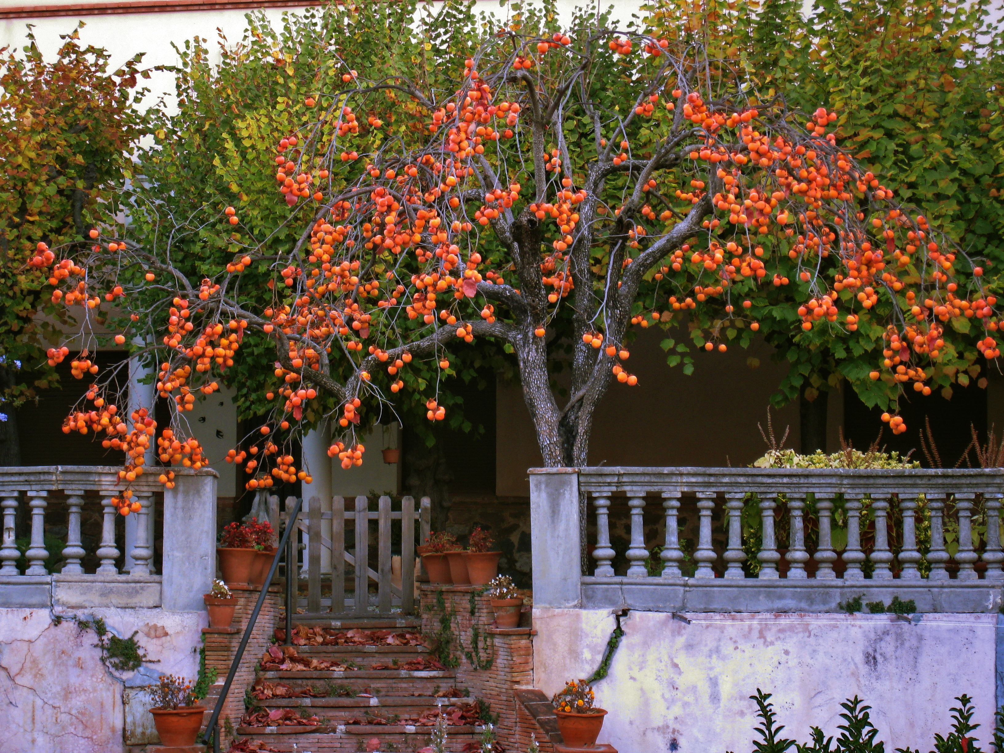 Caquis en un jardí de l'Ametlla del Vallès